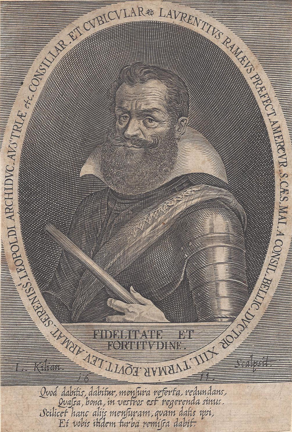 Laurentius Ramée als Generalobrist im Kürass, Kupferstich von Lucas Kilian, 1611.